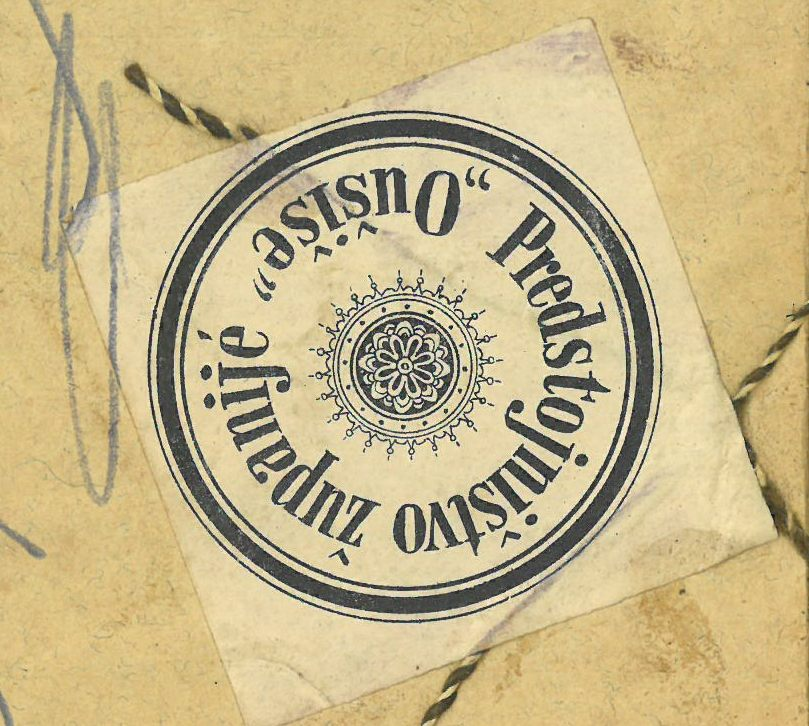 Žig občine Ovsiše 1882